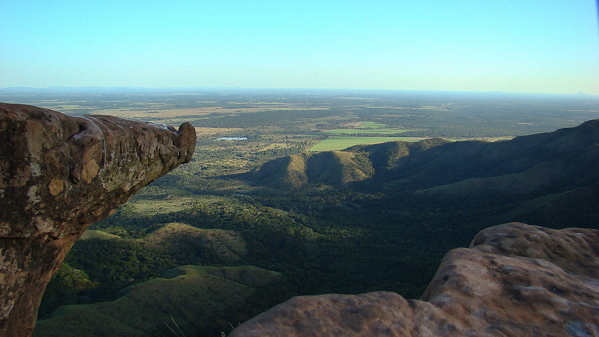 PARQUE NACIONAL DA CHAPADA DOS GUIMARÃES - MATO GROSSO